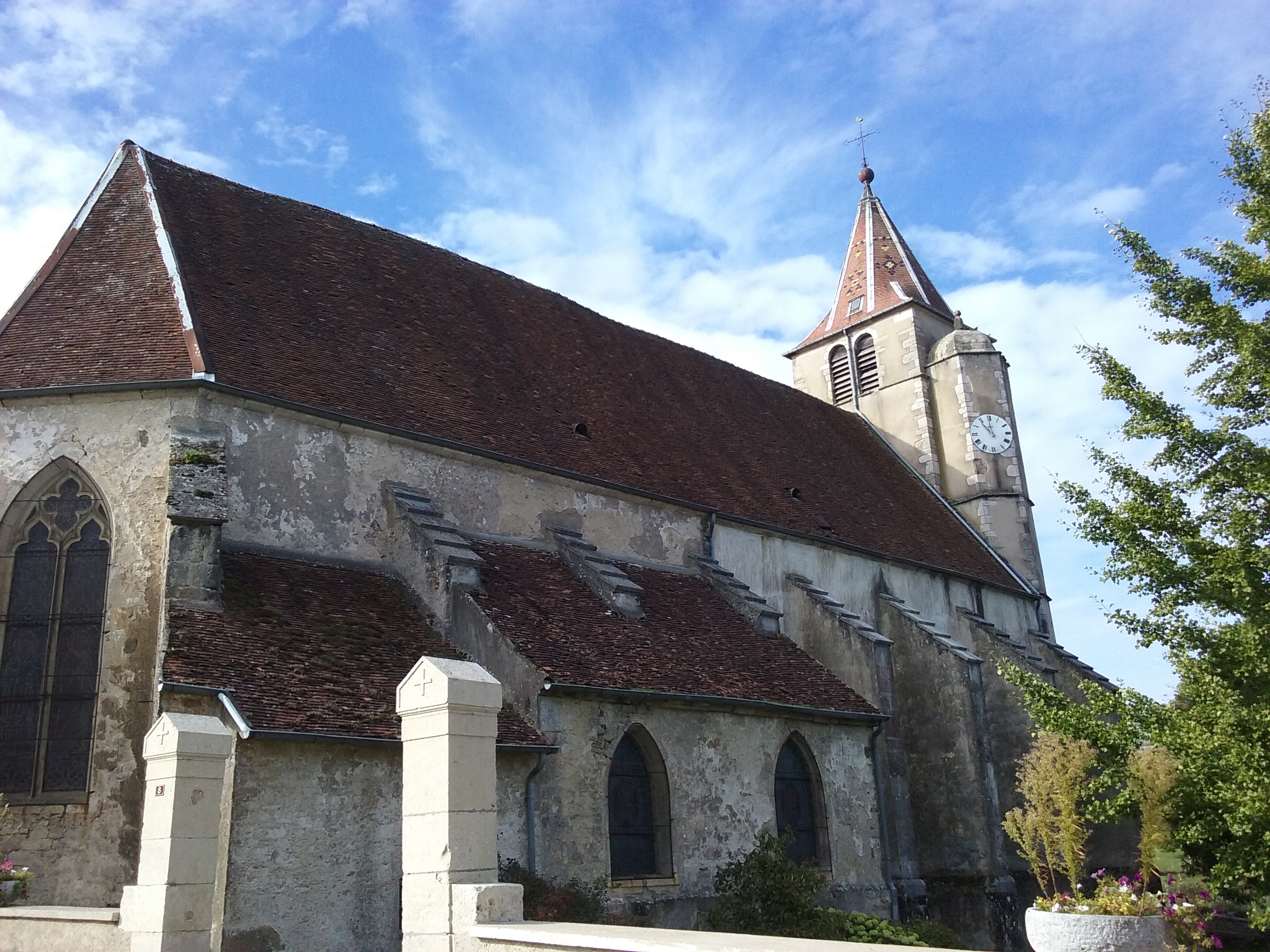 Eglise